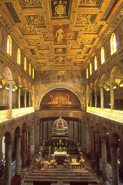 Basilica of Sant'Agnese fuori le mura, Rome. Inside